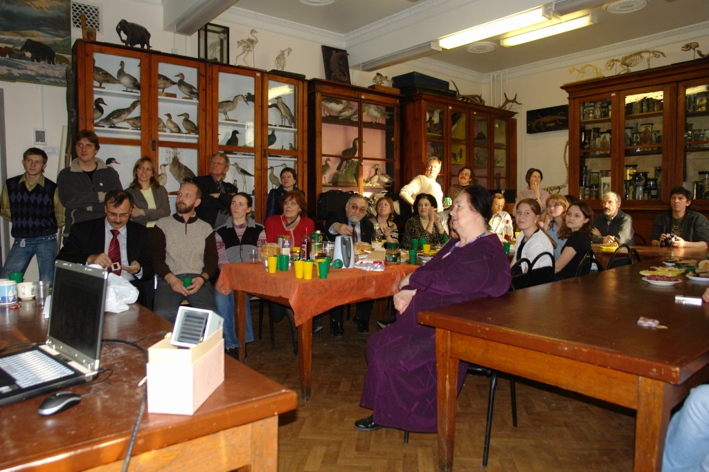 60-летие Кафедры зоологии и экологии, Биолого-химический факультет МПГУ, 2009.